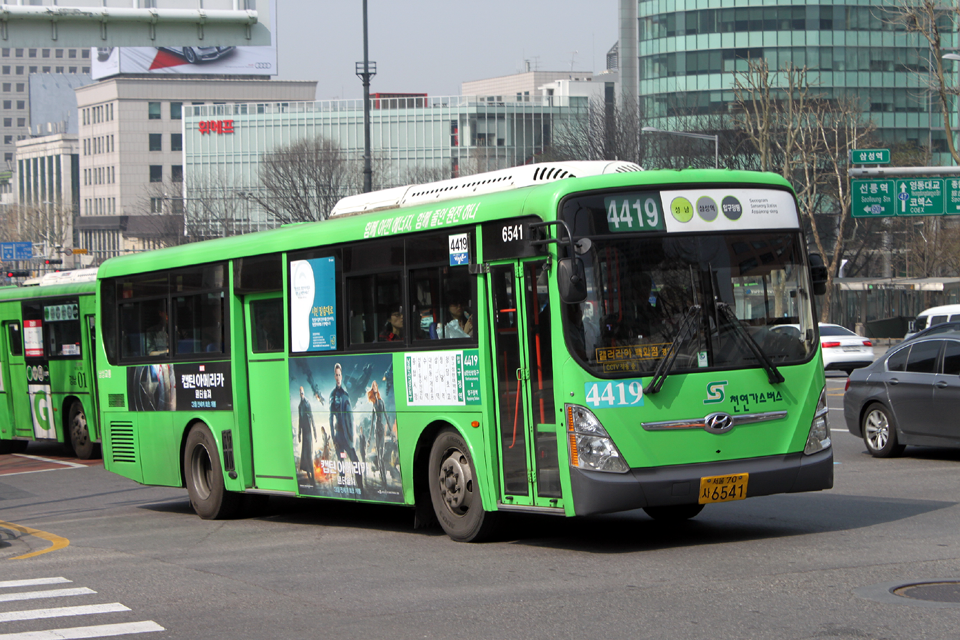 서울특별시 신흥기업 소속 4419번 시내버스